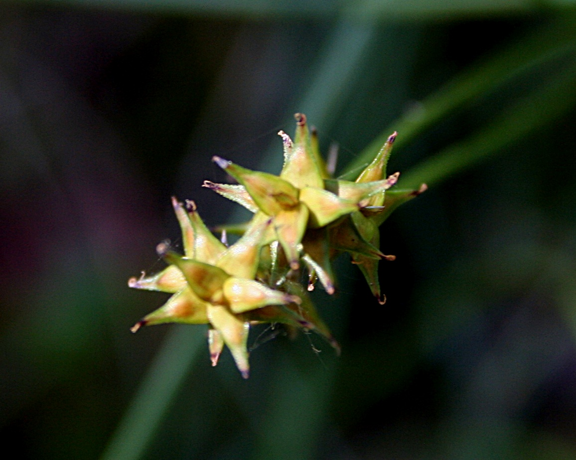 Turzyca gwiazdkowata - owocostan